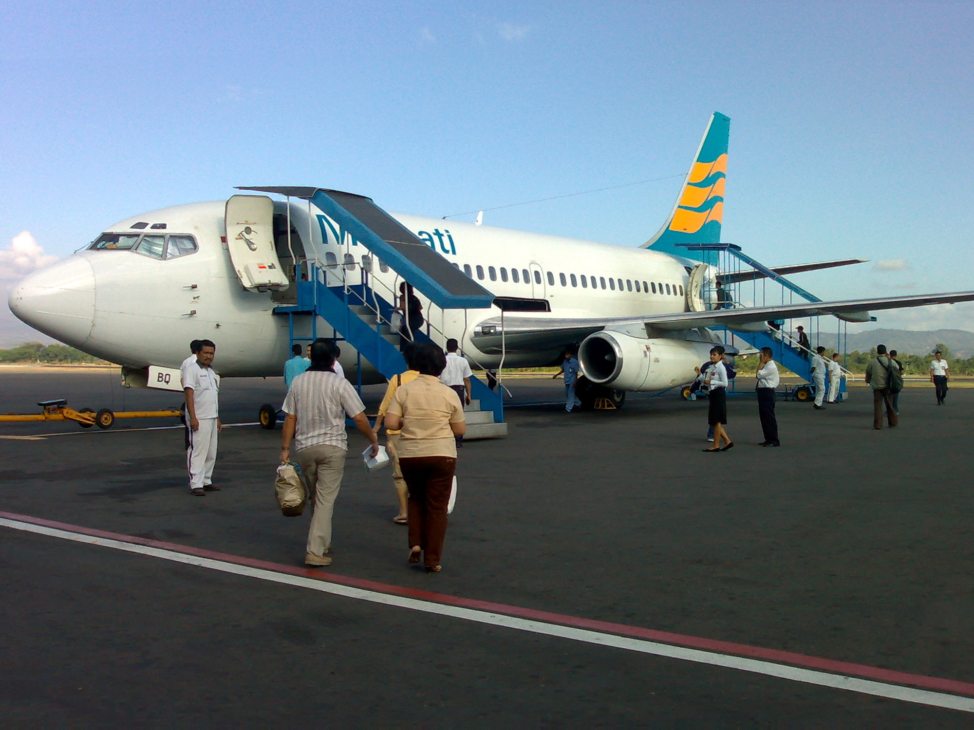 Merpati Boeing 737-200 at Yogyakarta airport, Java, Indonesia